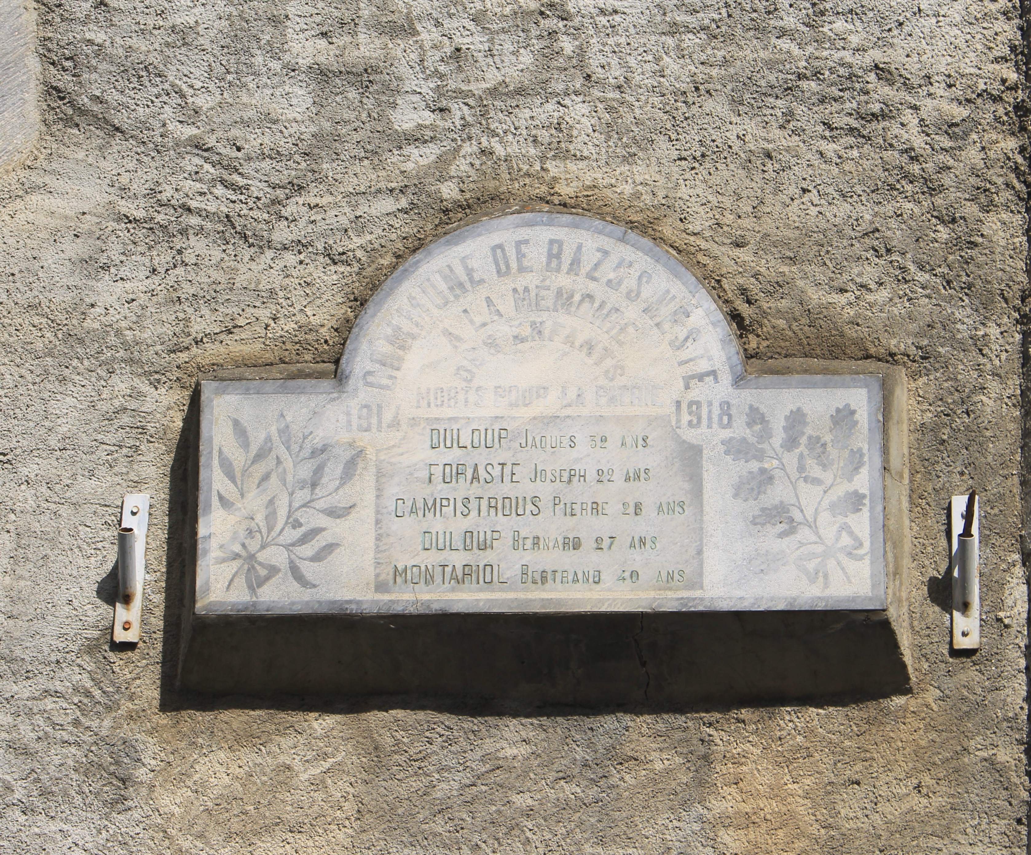 Monument aux morts de Bazus-Neste (Hautes-Pyrénées)